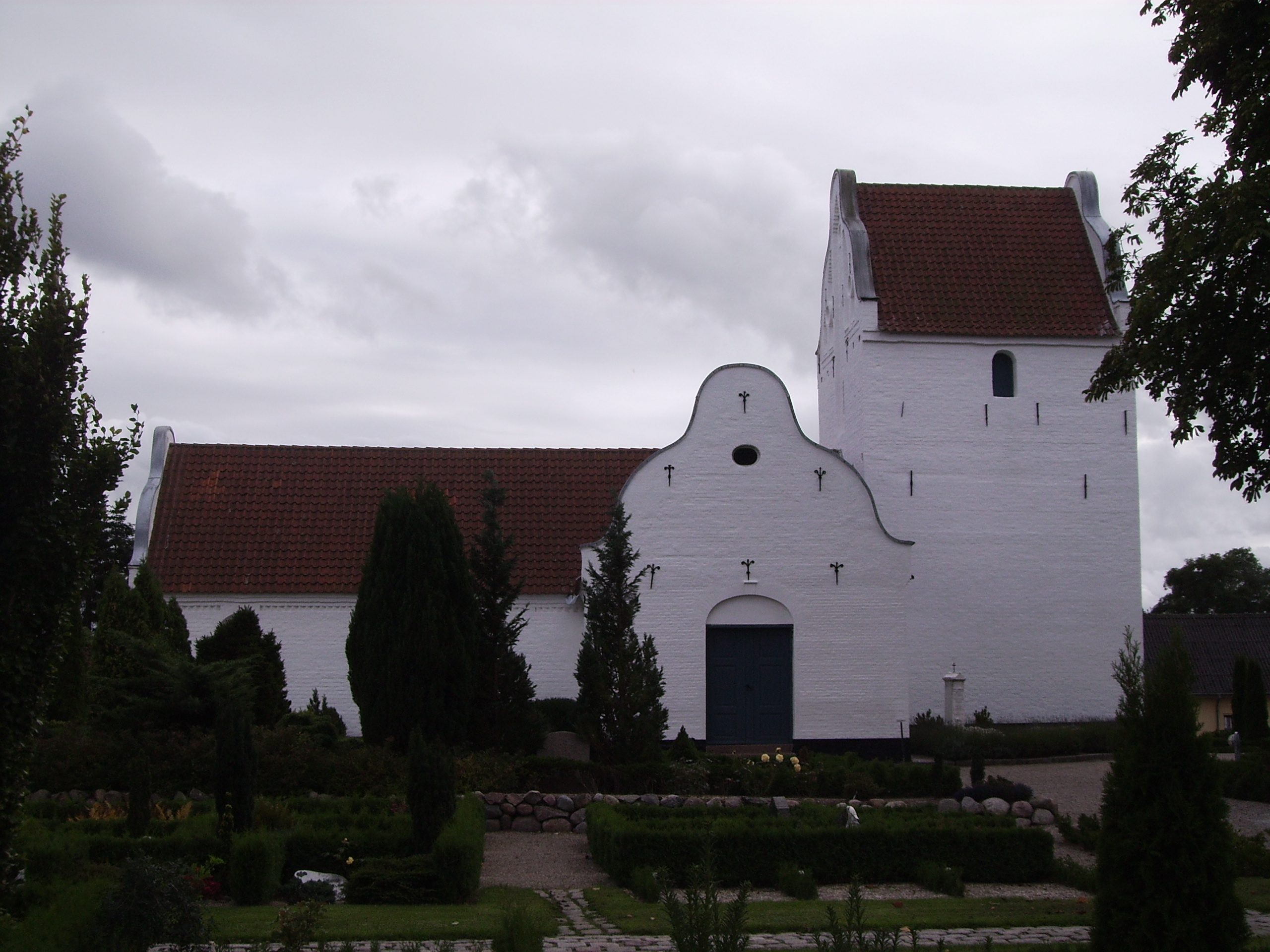 Højby Kirke fra nord, Højby Sogn, Åsum Herred, Odense Amt, Denmark (Danish Church)